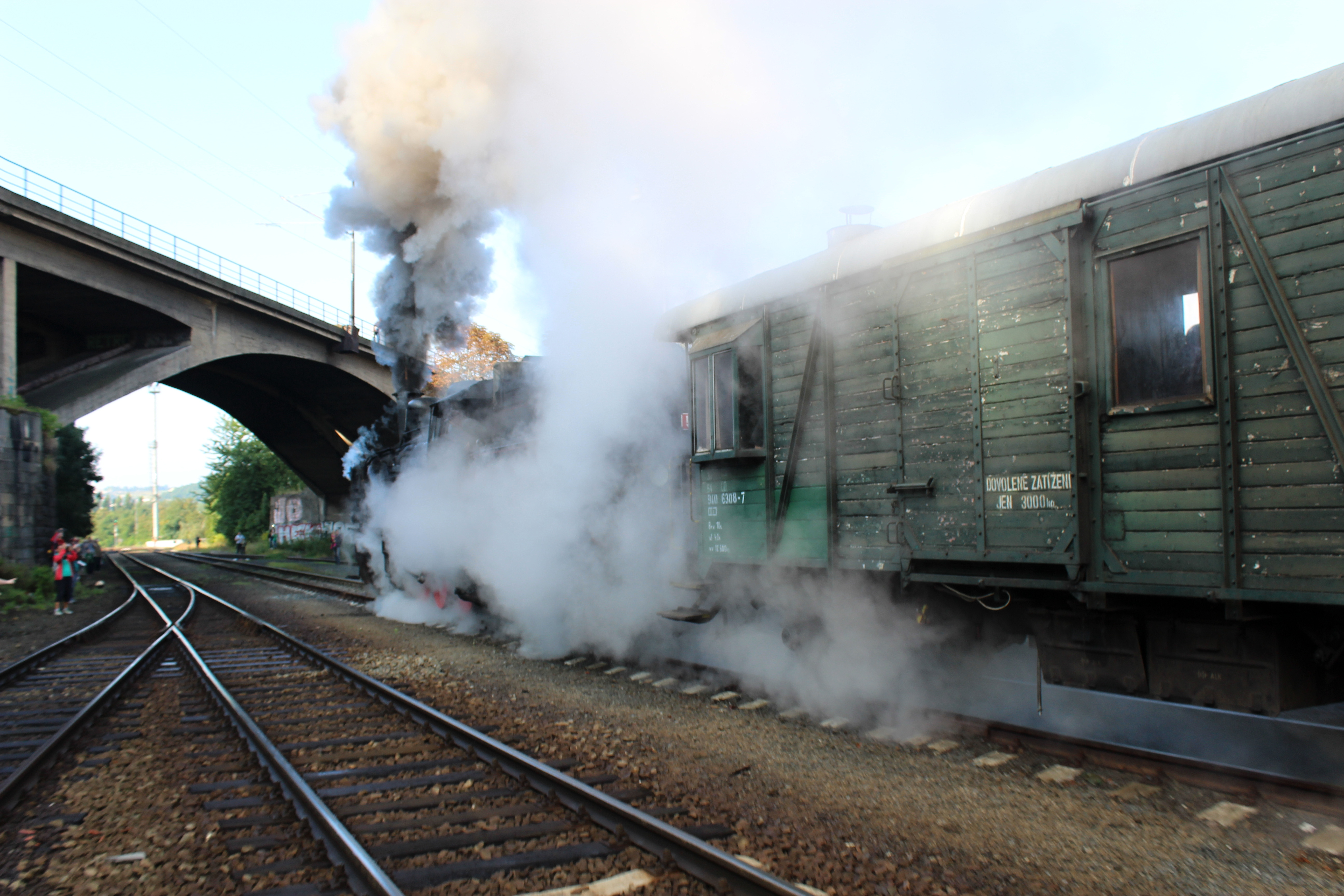 Parní lokomotiva 4342186 – Čtyřkolák před nostalgickou jízdou na nádraží Praha – Braník 30. 8. 2014 v 8.57 nostalgická jízda na trati Praha – Braník – Čerčany a zpět. Číslo stroje: 4343186 – na kotli ČSD 4342186 – na boku Údaje na originálním výrobním štítku: Výrobce: Akc. spol. strojírny dříve BREITFELD, DANĚK i spol. Slaný Č.: 95 Rok výroby: 1917 Provozovatel: Pražská dráha Depo Vršovice Více na